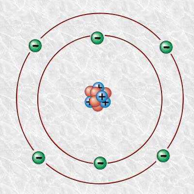 Configuración electrónica del átomo de carbono